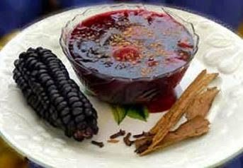 Mazamorra avec de la canelle.